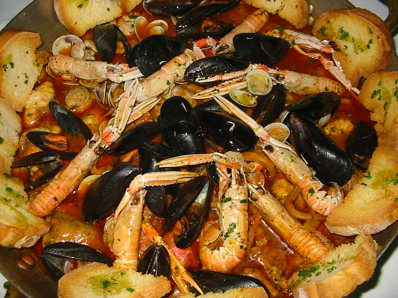 Zuppa di pesce a base di: pesce dell'Adriatico Foto scattata presso i laboratori dell'IIS Panzini Senigallia (AN)